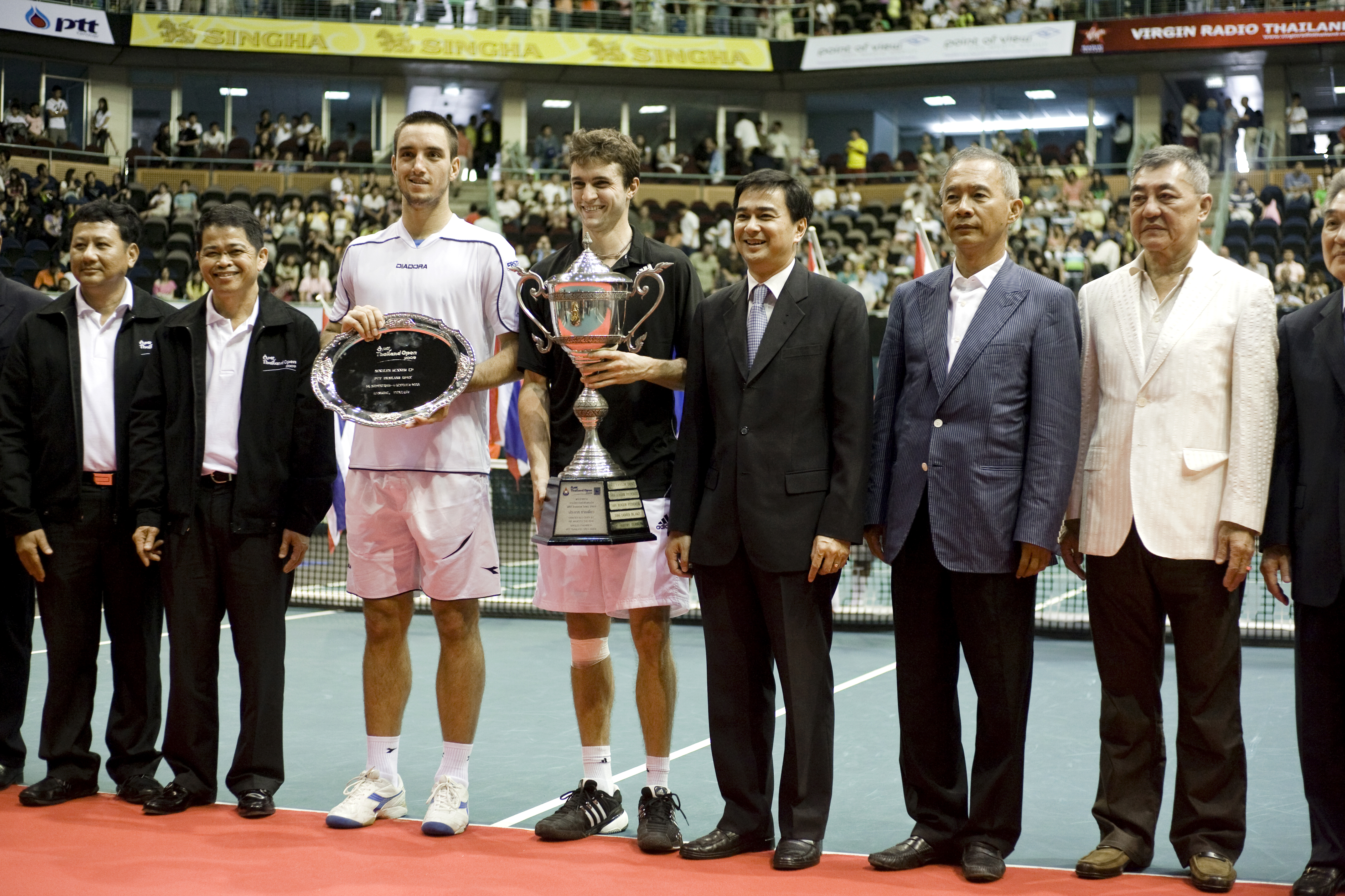 Gilles Simon (French professional tennis player) ผู้ชนะการแข่งขันรายการ PTT Thailand Open 2009 Viktor Troicki (Serbian professional tennis player) รองชนะเลิศรายการ PTT Thailand Open 2009 ถ่ายภาพร่วมกับนายกรัฐมนตรีและคณะผู้จัดการแข่งขัน นายกรัฐมนตรี ชมการแข่งขันเทนนิสนัดชิงชนะเลิศรายการ PTT Thailand Open 2009 และมอบรางวัลแก่ผู้ชนะการแข่งขัน ณ อิมแพค อารีน่า เมืองทองธานี 4ตุลาคม2552 (The Official Site of The Prime Minister of Thailand Photo by พีรพัฒน์ วิมลรังครัตน์)